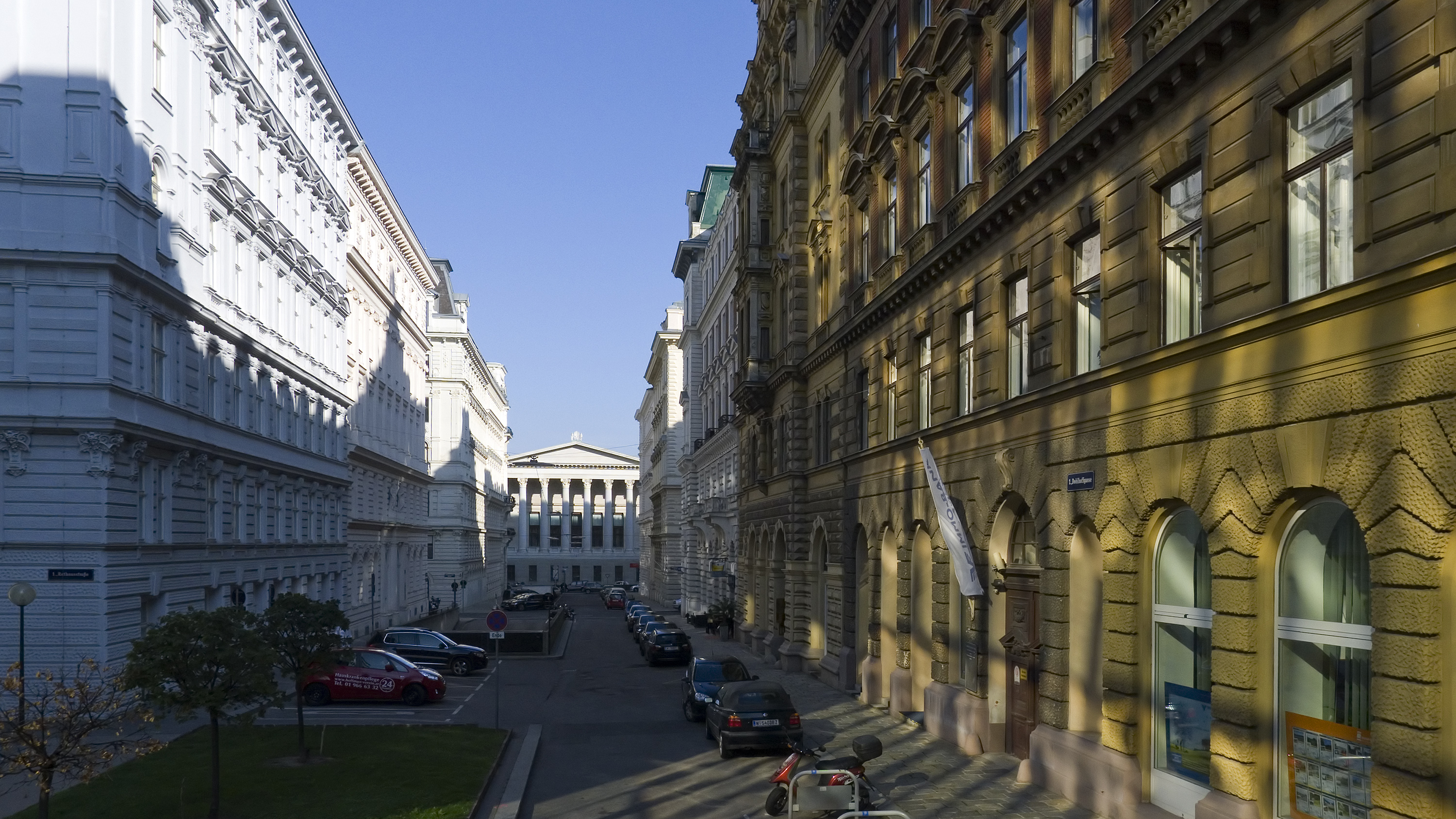 Doblhoffgasse in Wien 1 bei Nr. 9 Richtung Osten